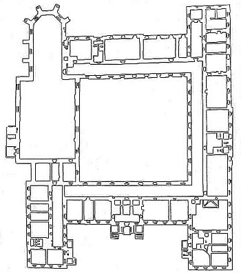 Kloster Grafschaft, Plan (1832) mit alter Klosterkirche